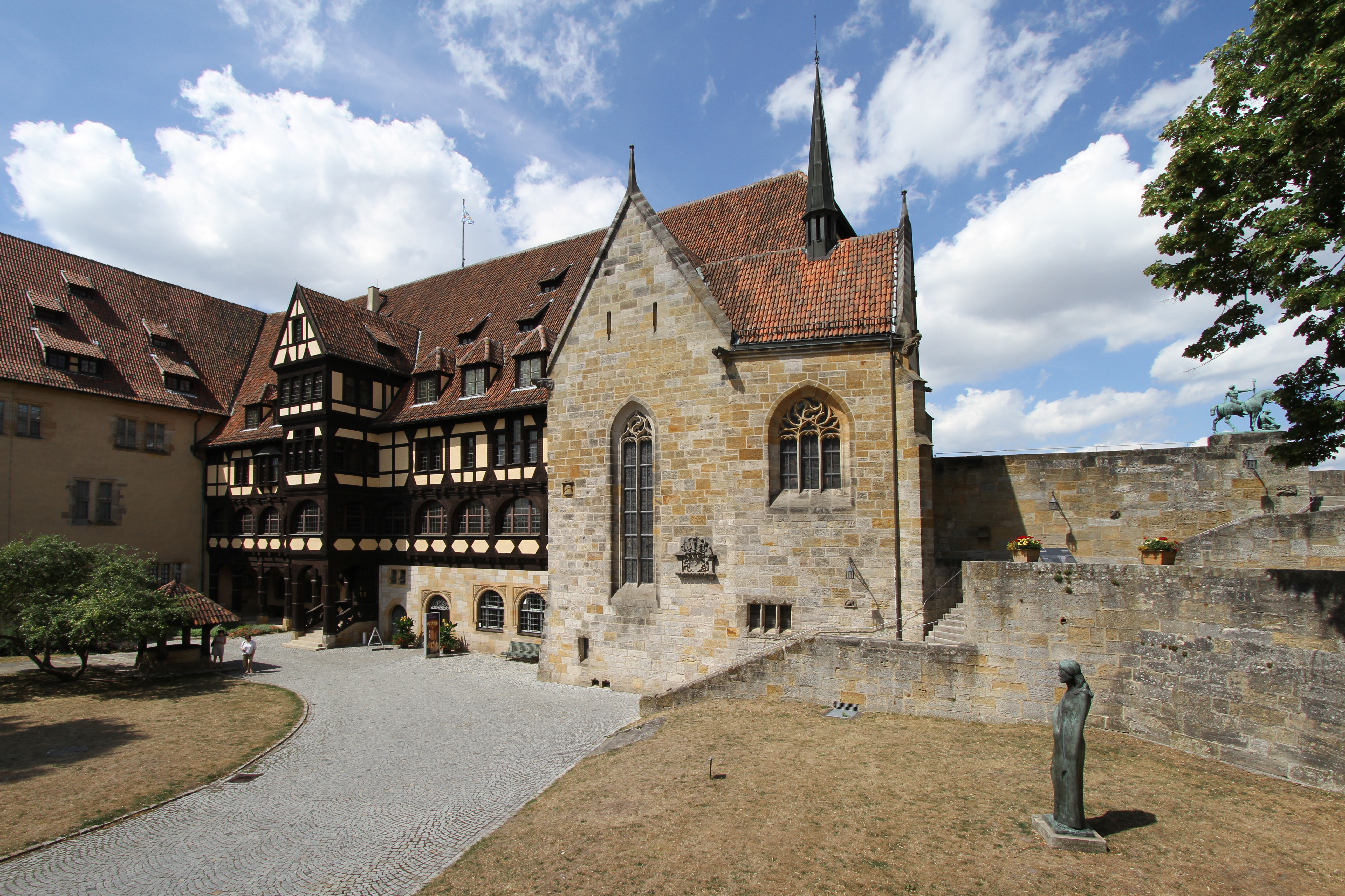 Veste Coburg